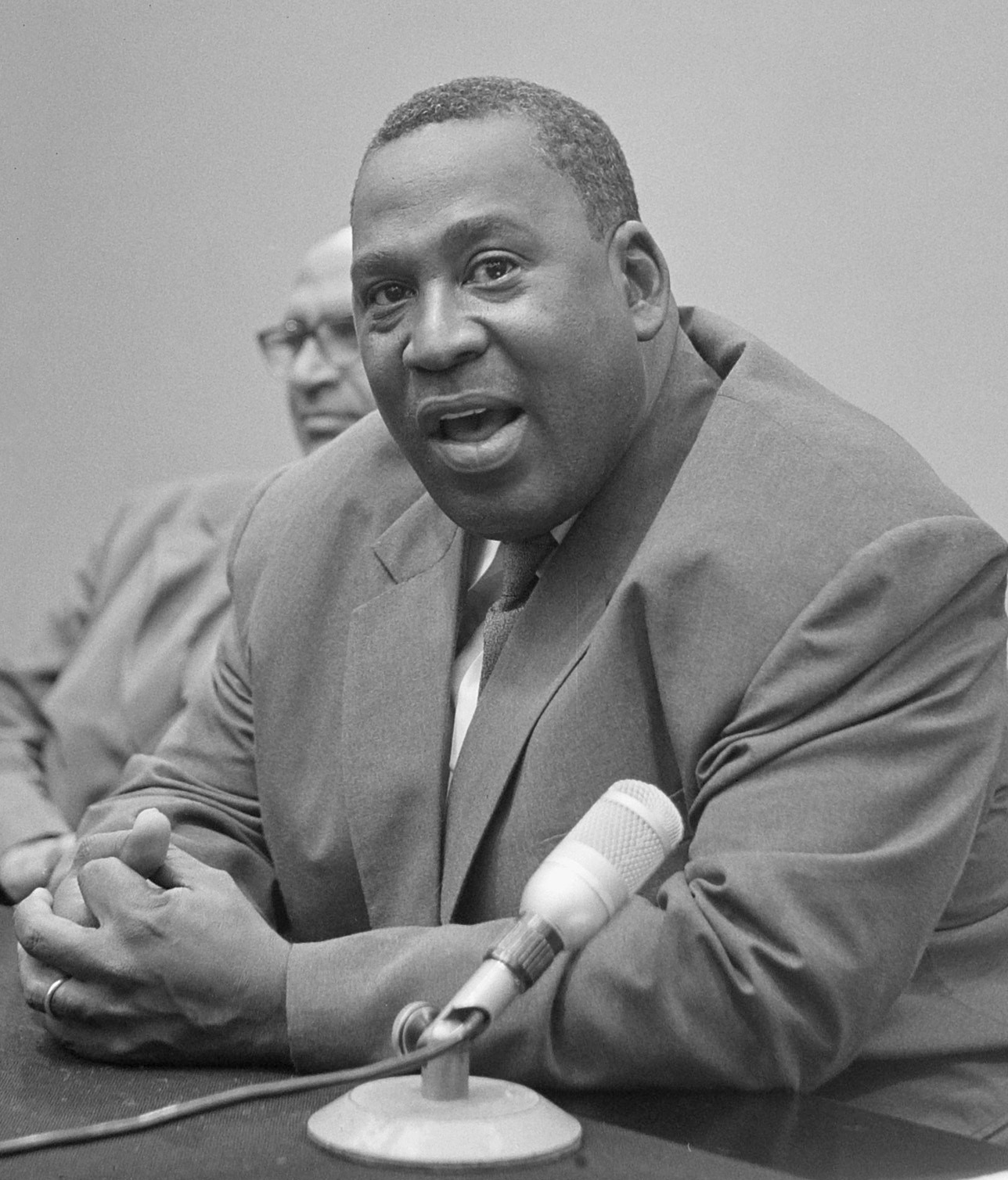 Minister-President Pengel van Suriname in Nederland aangekomen. (Kop) Pengel